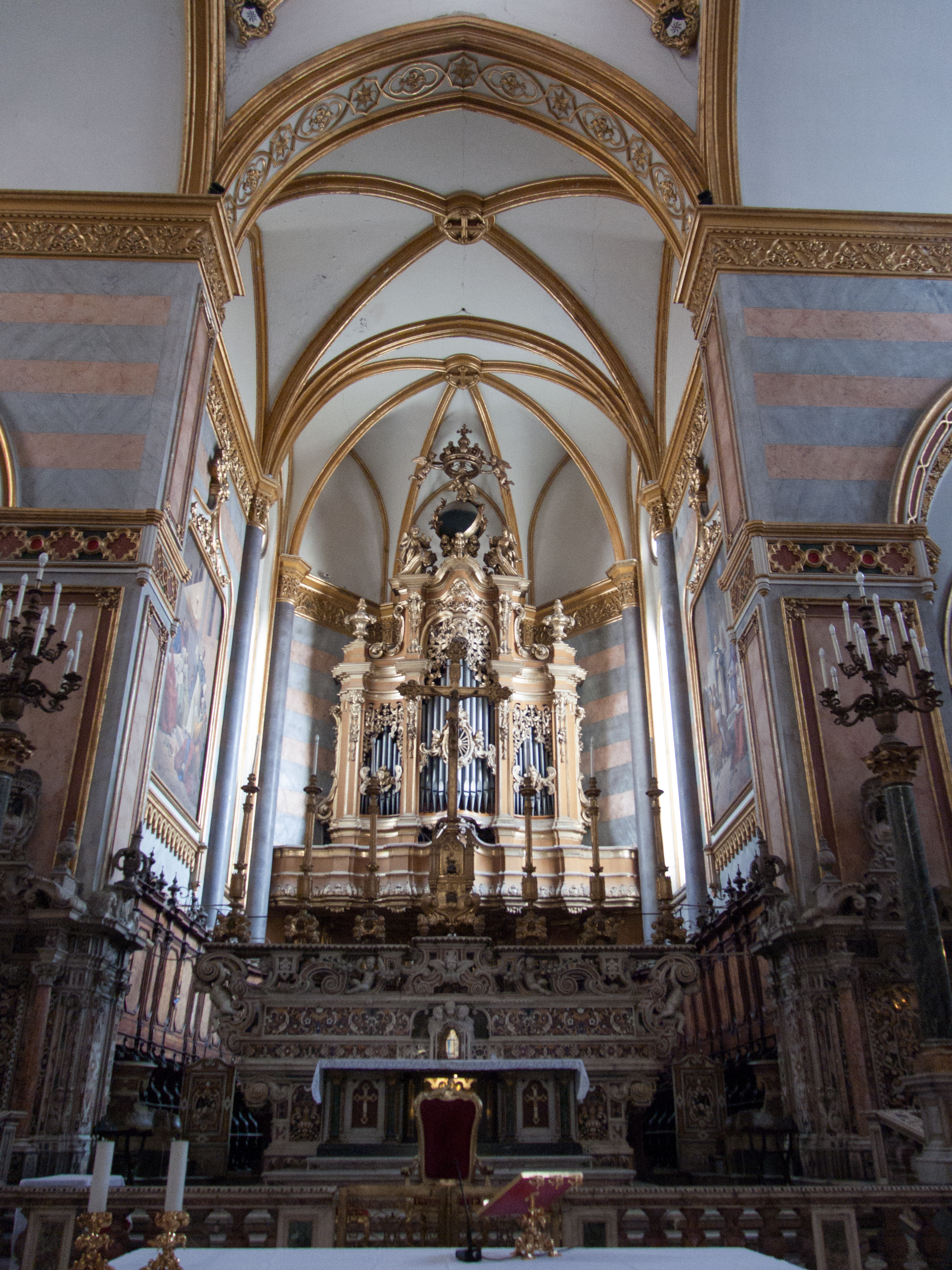 Chiesa di San Domenico Maggiore di Napoli - Abside